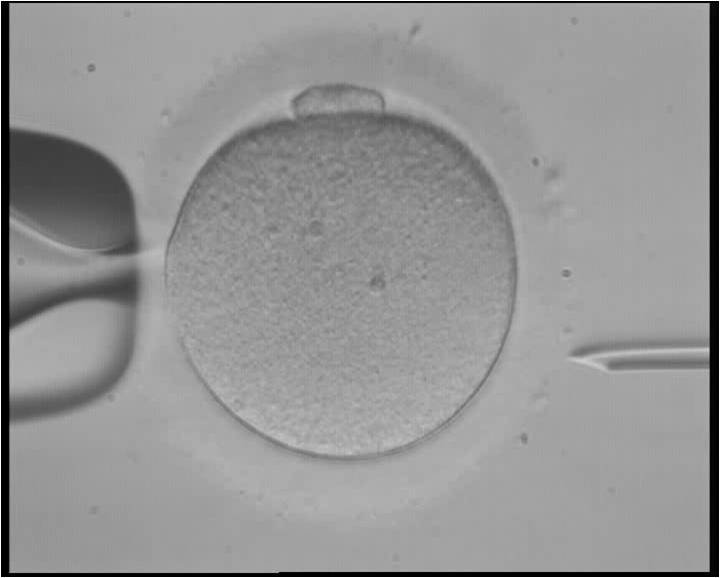 Intracytoplasmic sperm injection (ICSI)